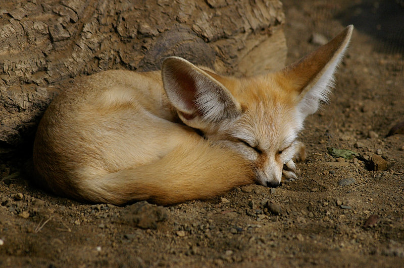 Fennecus dormiens